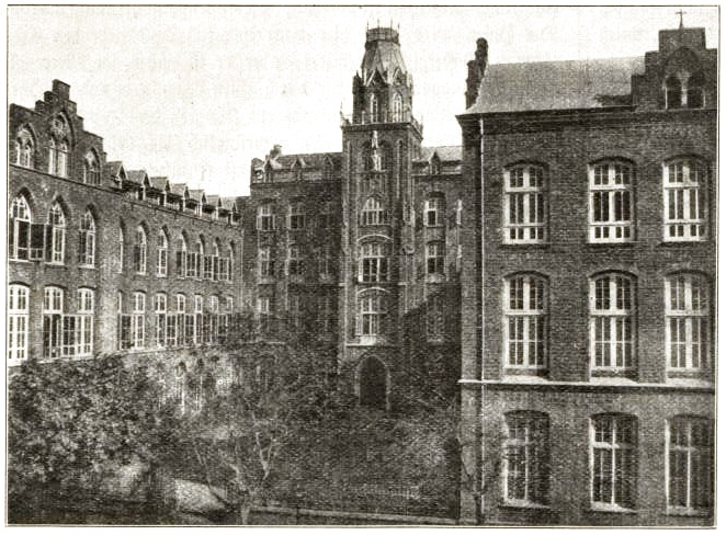 St. Xaviers High School Bombay, erbaut nach Plänen von Pater Karl Wagner S.J. aus Mainz